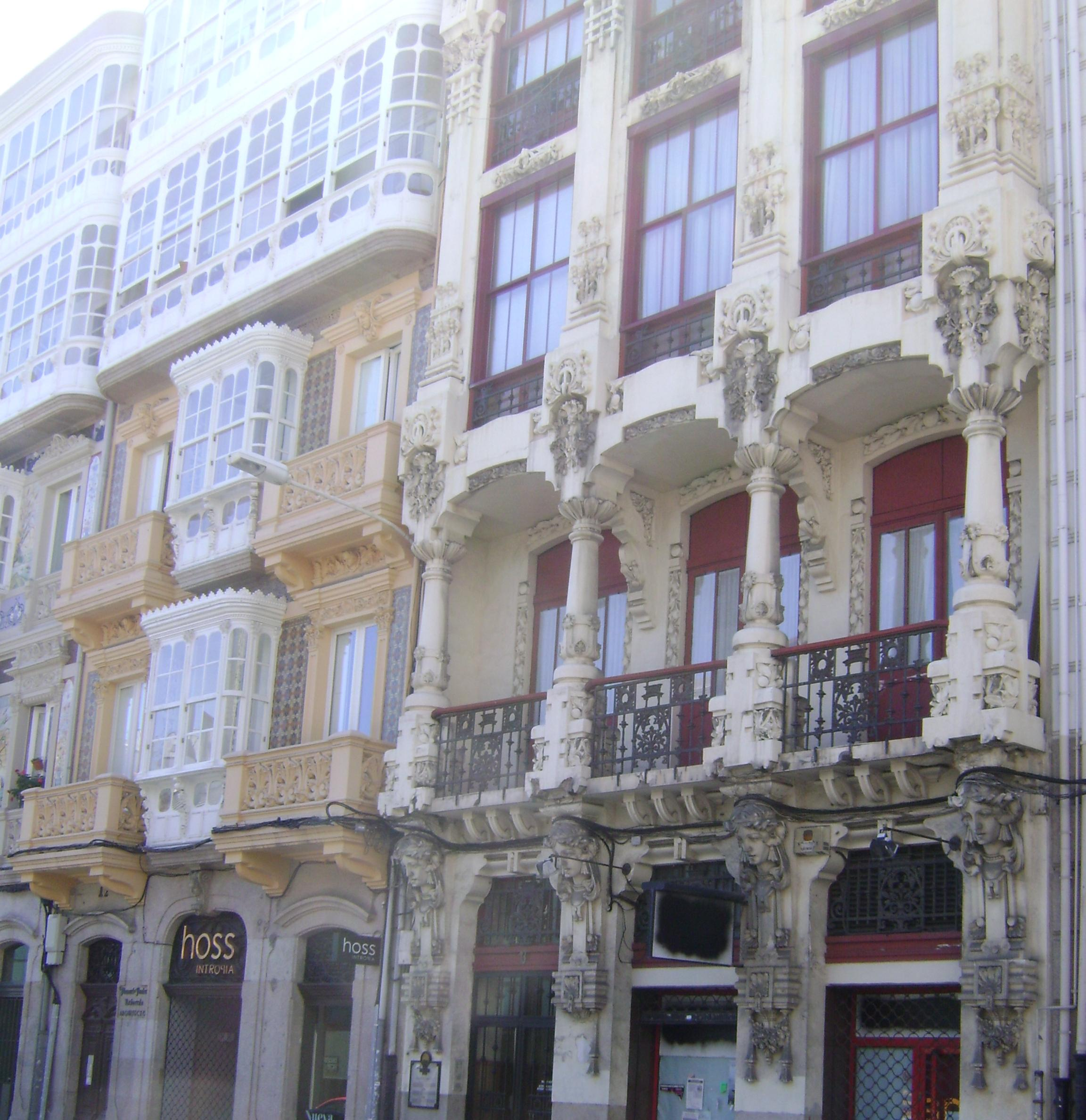 Edificios modernistas en La Coruña, España.